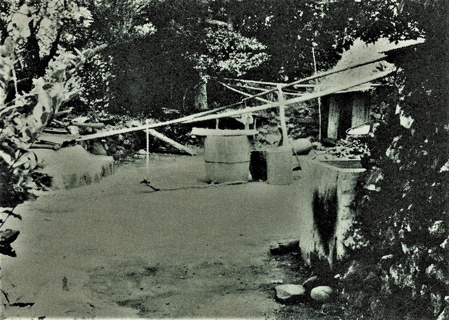 八丈小島鳥打地区の天水桶（昭和30年頃）